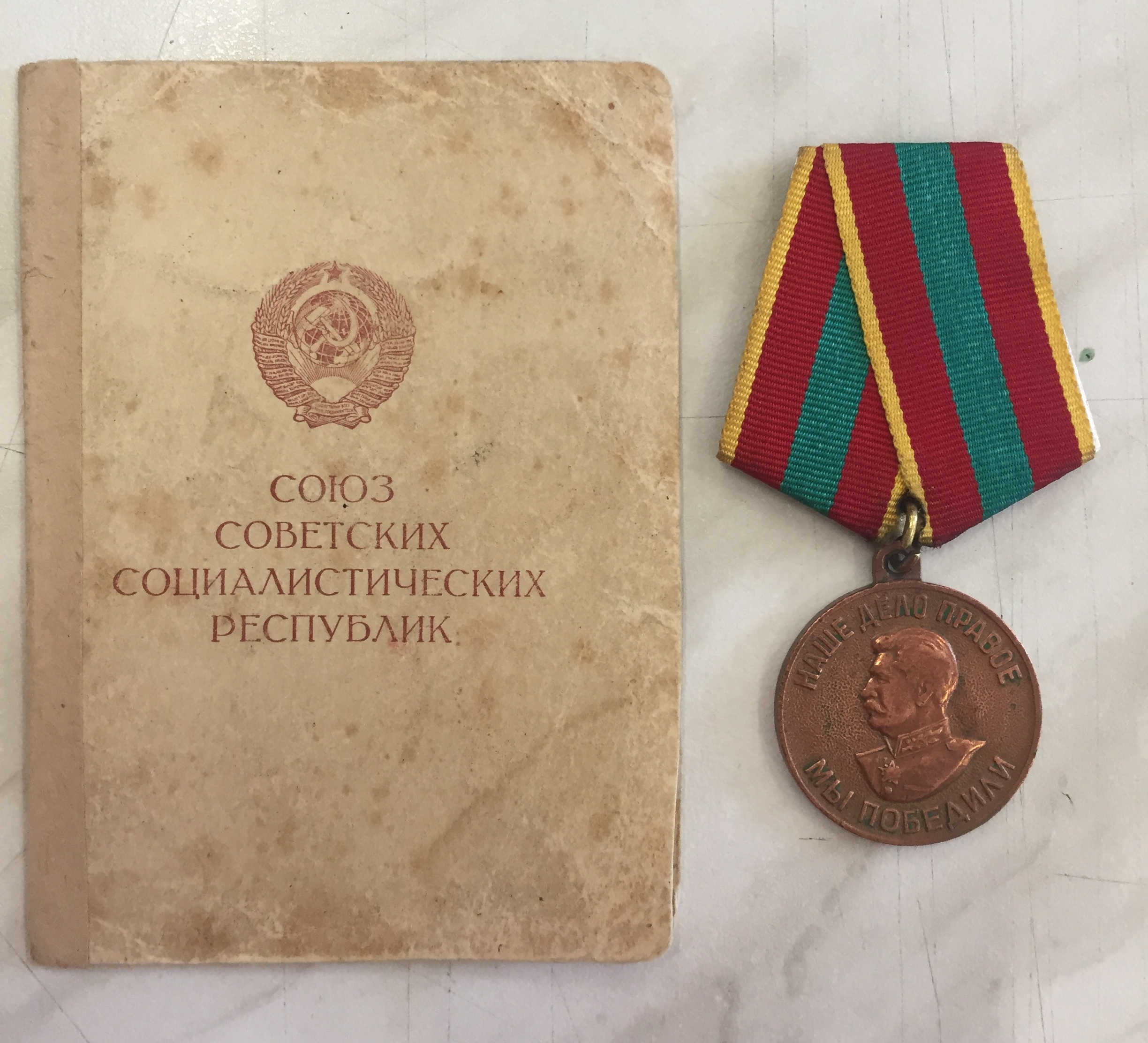 Медаль «За доблестный труд в Великой Отечественной войне 1941-1945 гг.»